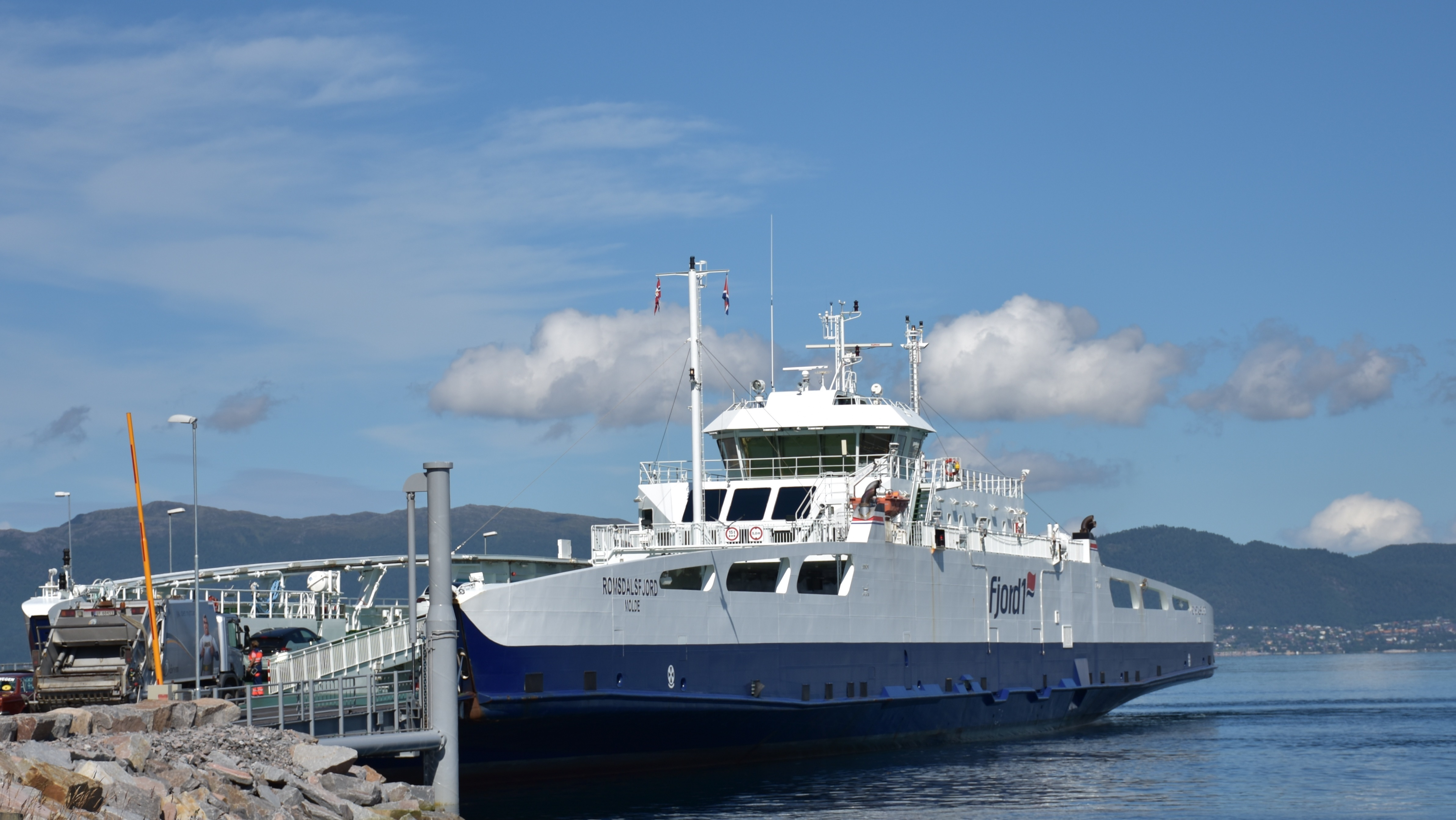 MF Romsdalsfjord ved kai på Furneset i Vestnes